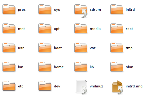 Imágen que muestra gráficamente el sistema de ficheros de Linux. Muestra los directorios del sistema, que están bajo la jerarquía del carácter / en un esplorador de archivos de alguna distribución de linux.